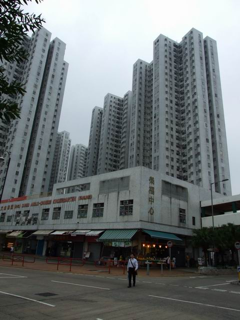 榮福中心